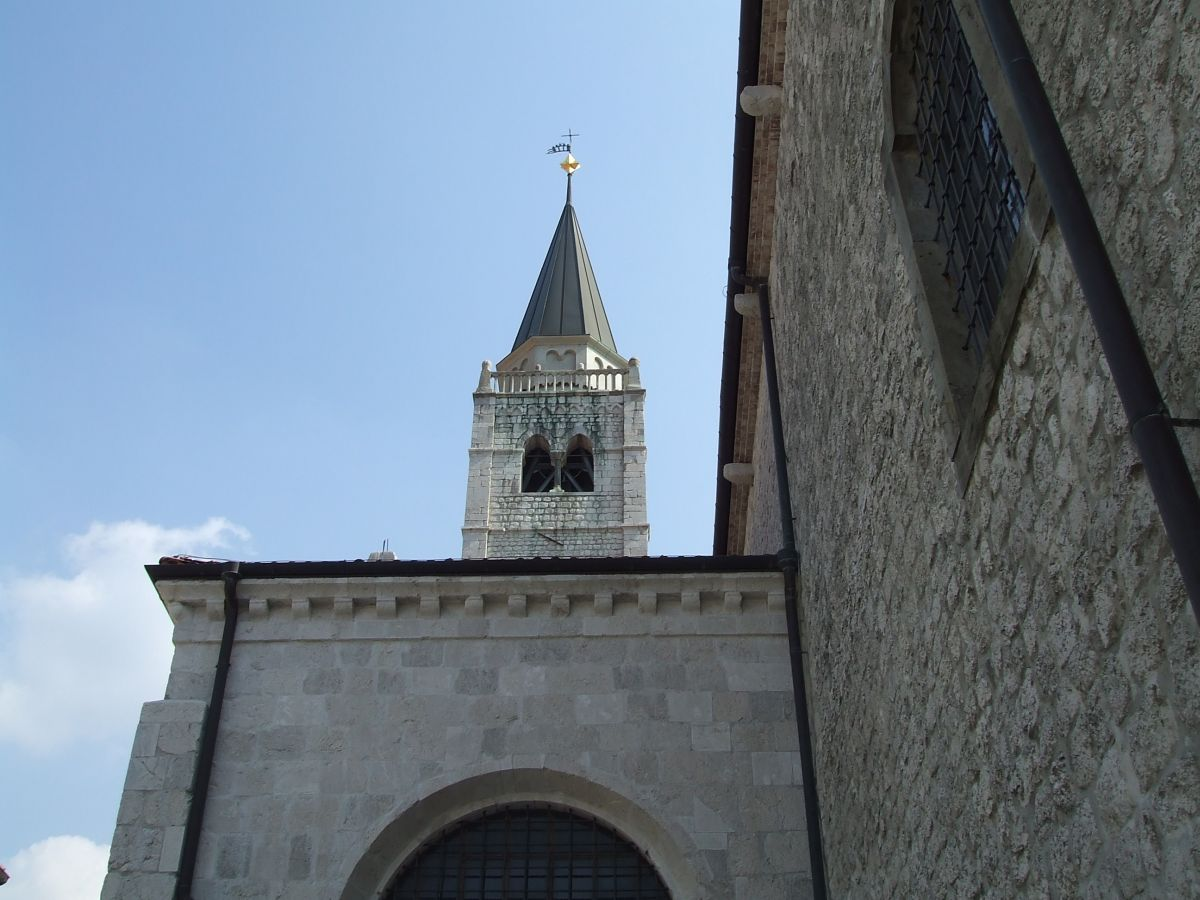 Sebi1, Venzone - Duomo, particolare del campanile